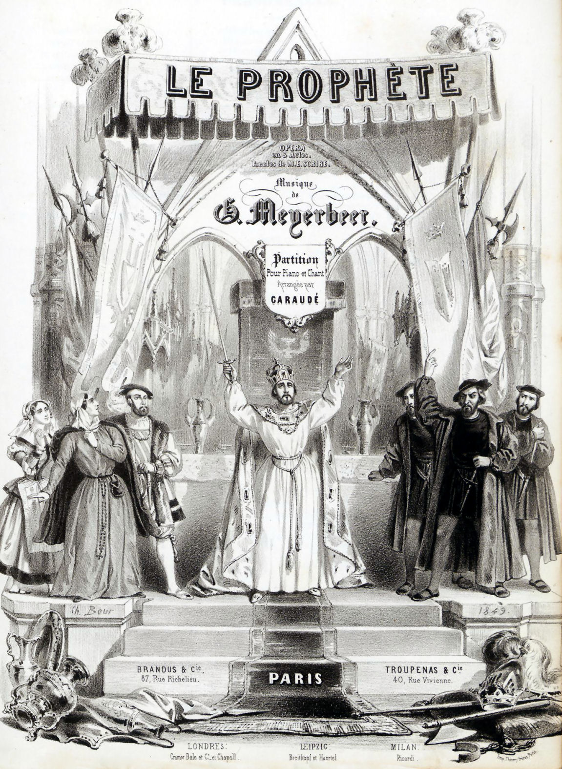 Gravure de Charles Bour (1814-1881) pour la publication de la partition piano et chant du Prophète de Meyerbeer (1849)